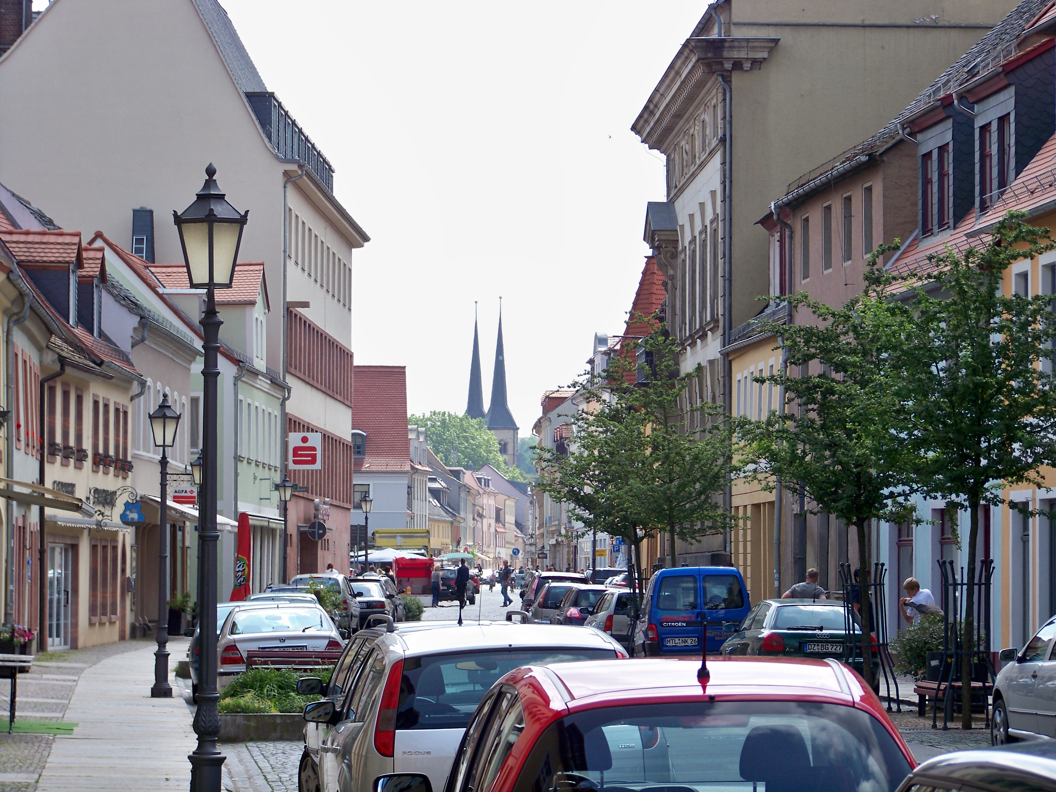 Hohnstädter Straße in Grimma mit Blick zur Frauenkirche